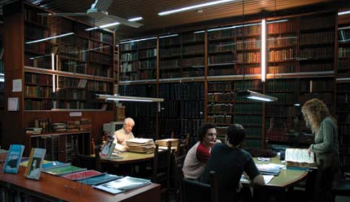 Bibliioteca "José de Marturana" en 2009